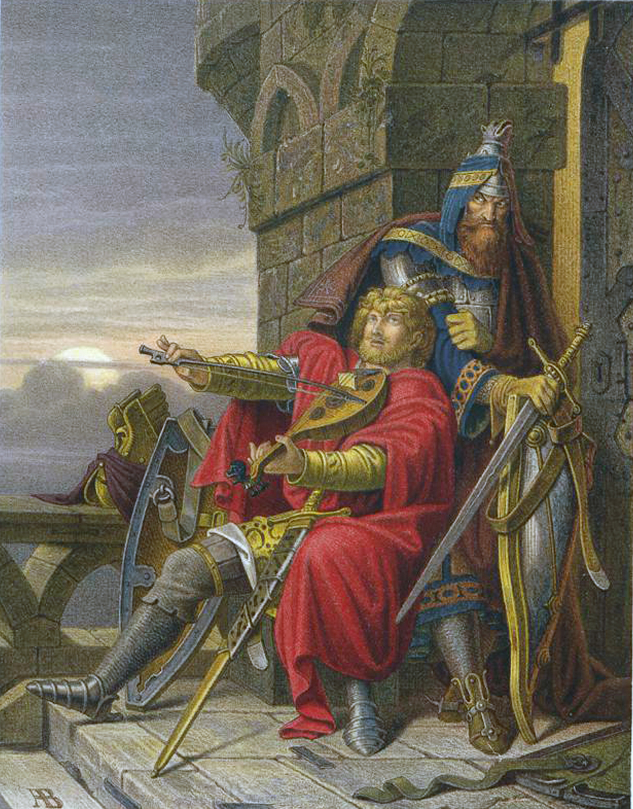 Düsseldorfer Künstleralbum, 16. Jg., 1866 gem. A. Baur, Lith. J.J. Dittmann